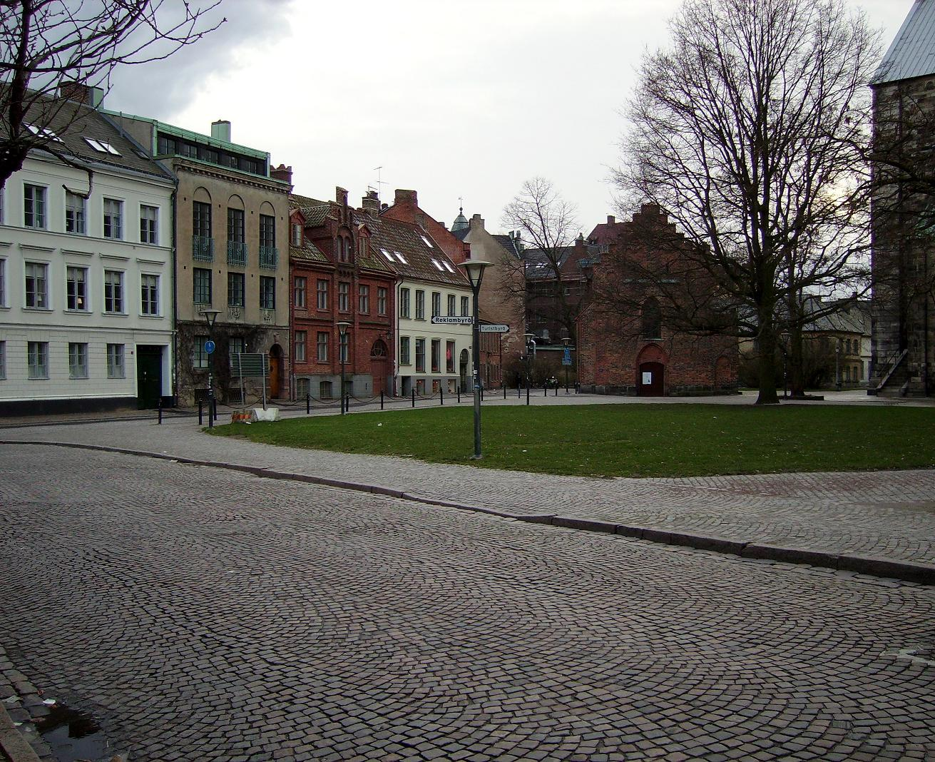 Krafts torg in Lund, Sweden